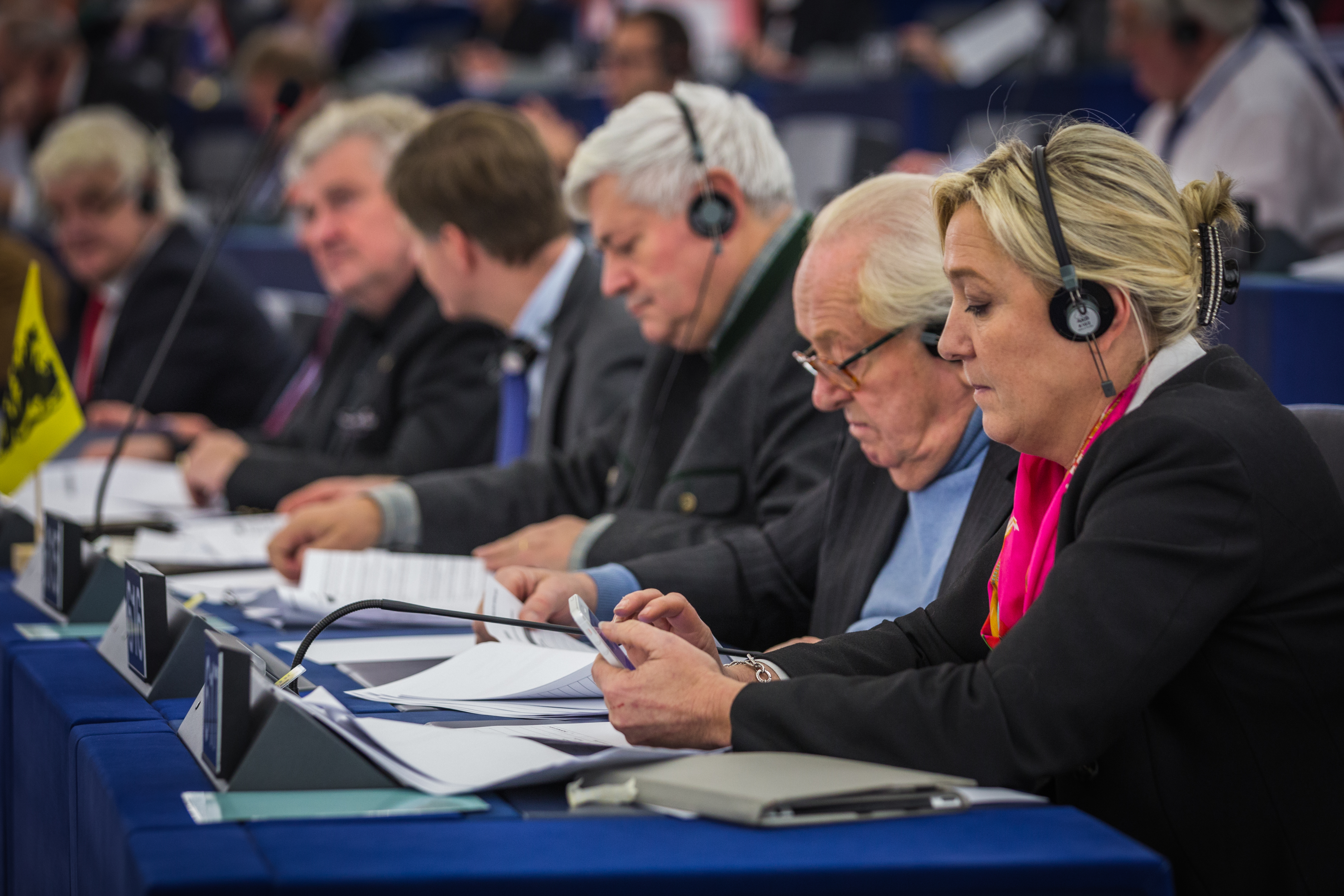 De droite à gauche : Marine Le Pen, Jean-Marie Le Pen et Bruno Gollnisch au Parlement européen de Strasbourg le 10 décembre 2013